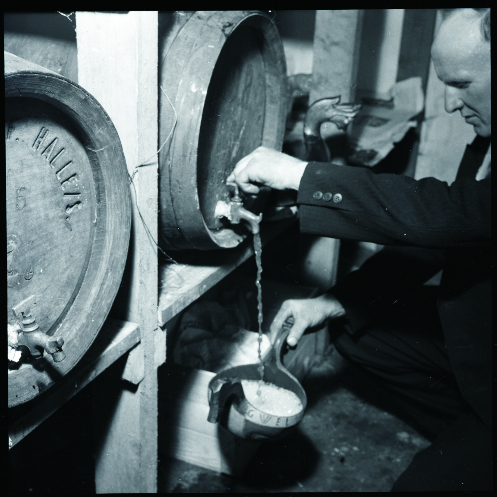 Tradisjonelt bryllup i Ulvik i Hardanger i mai 1954.